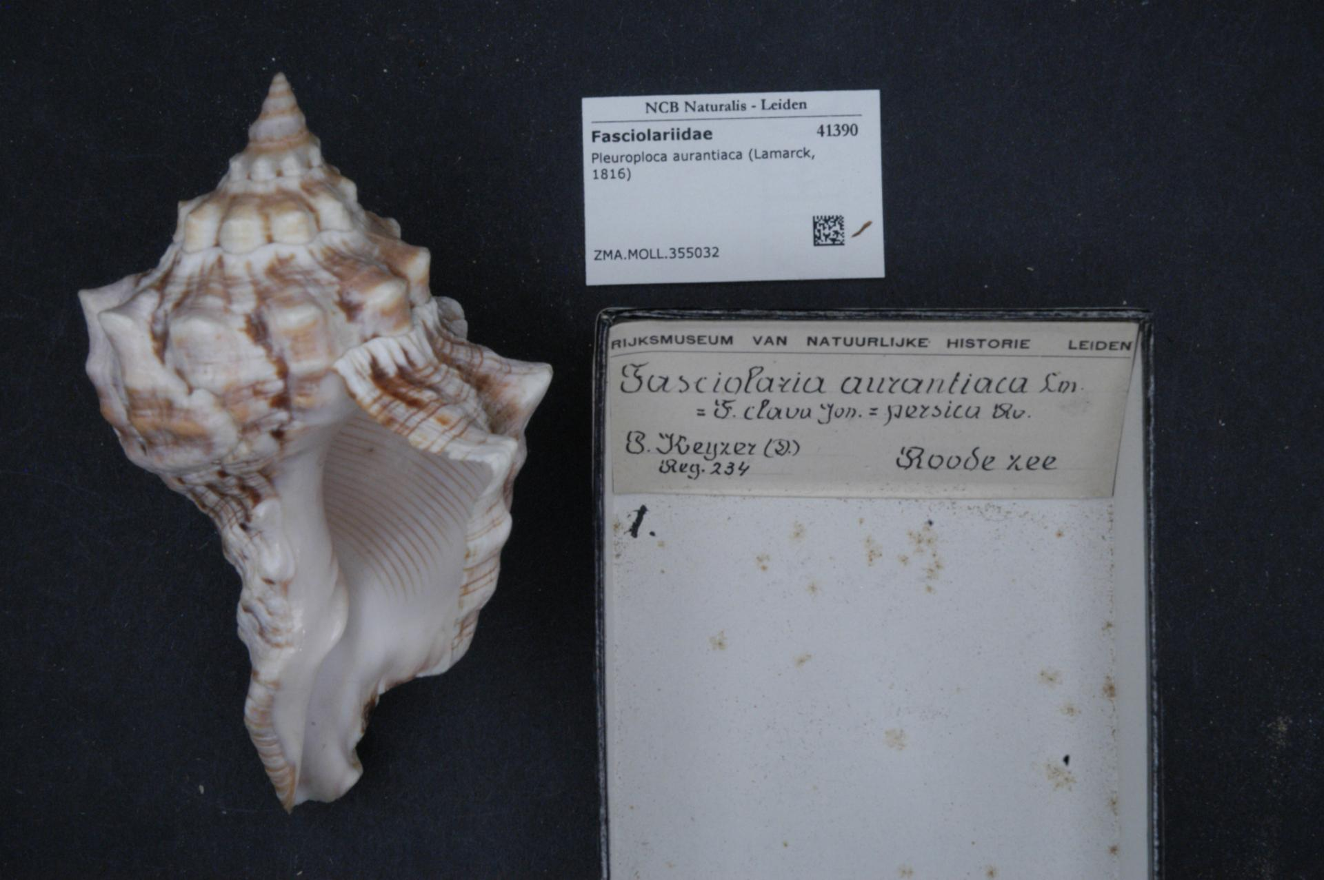 Tritonoharpa spec.